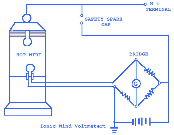 صورة توضح المخطط الصندوقي لفولتمتر الهواء المؤين